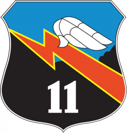 Gambar ini adalah Lambang Skuadron Udara 11, Koops AU II